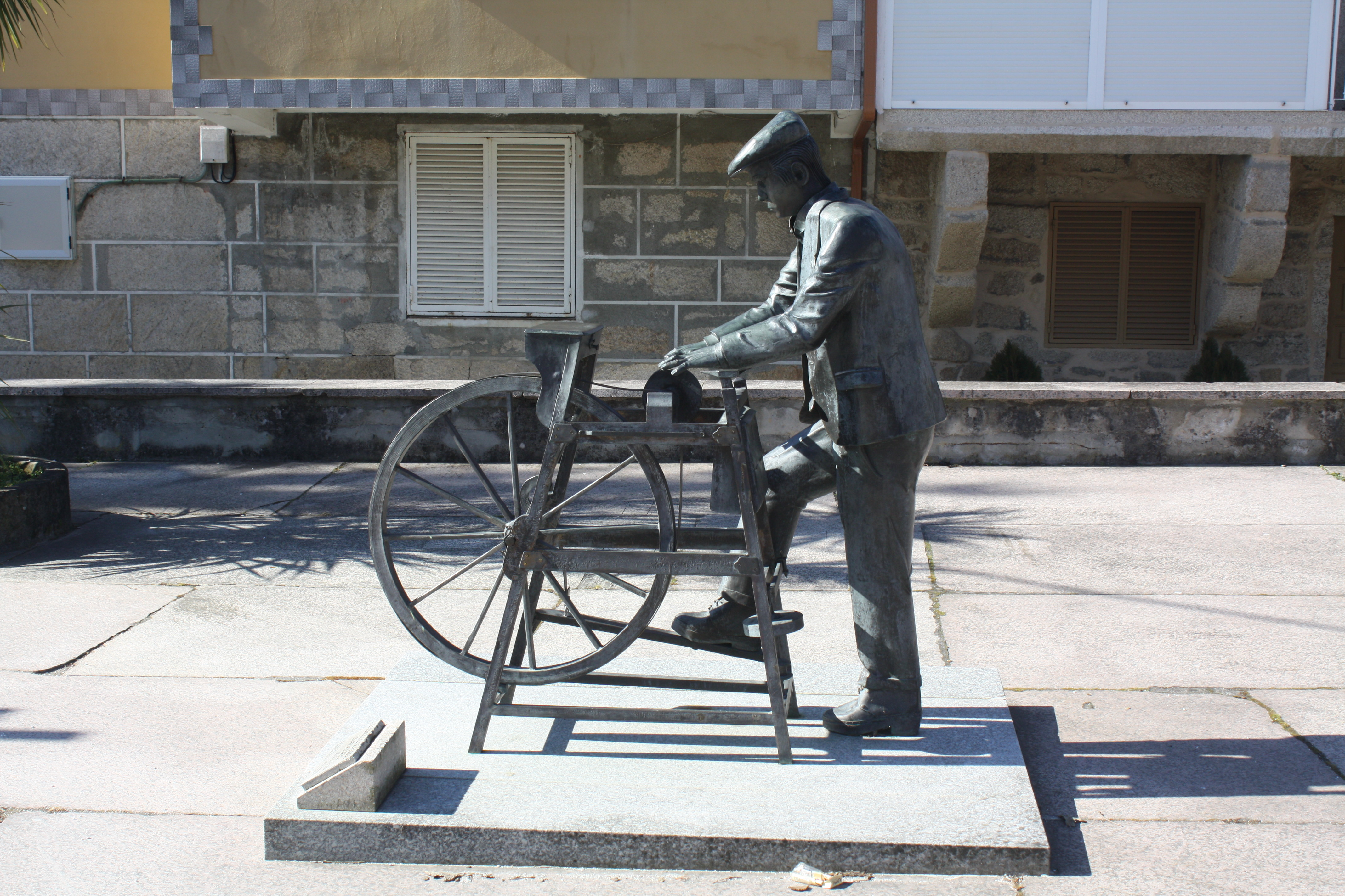 Monumento ós afiadores en Esgos (Ourense), do escultor Amadeo Rolán (2004).